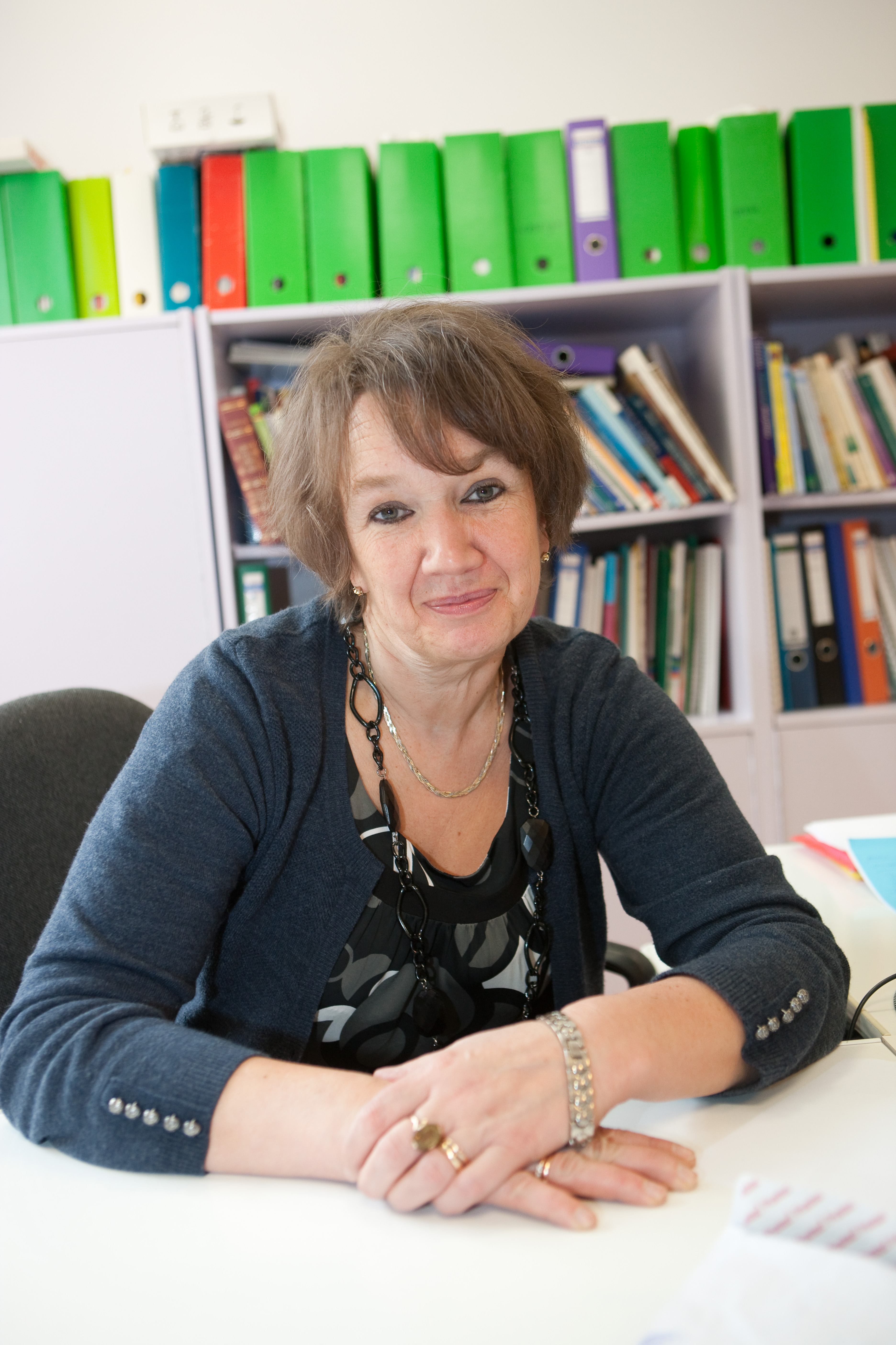 TÜ loodusteadusliku hariduse professor Miia Rannikmäe.